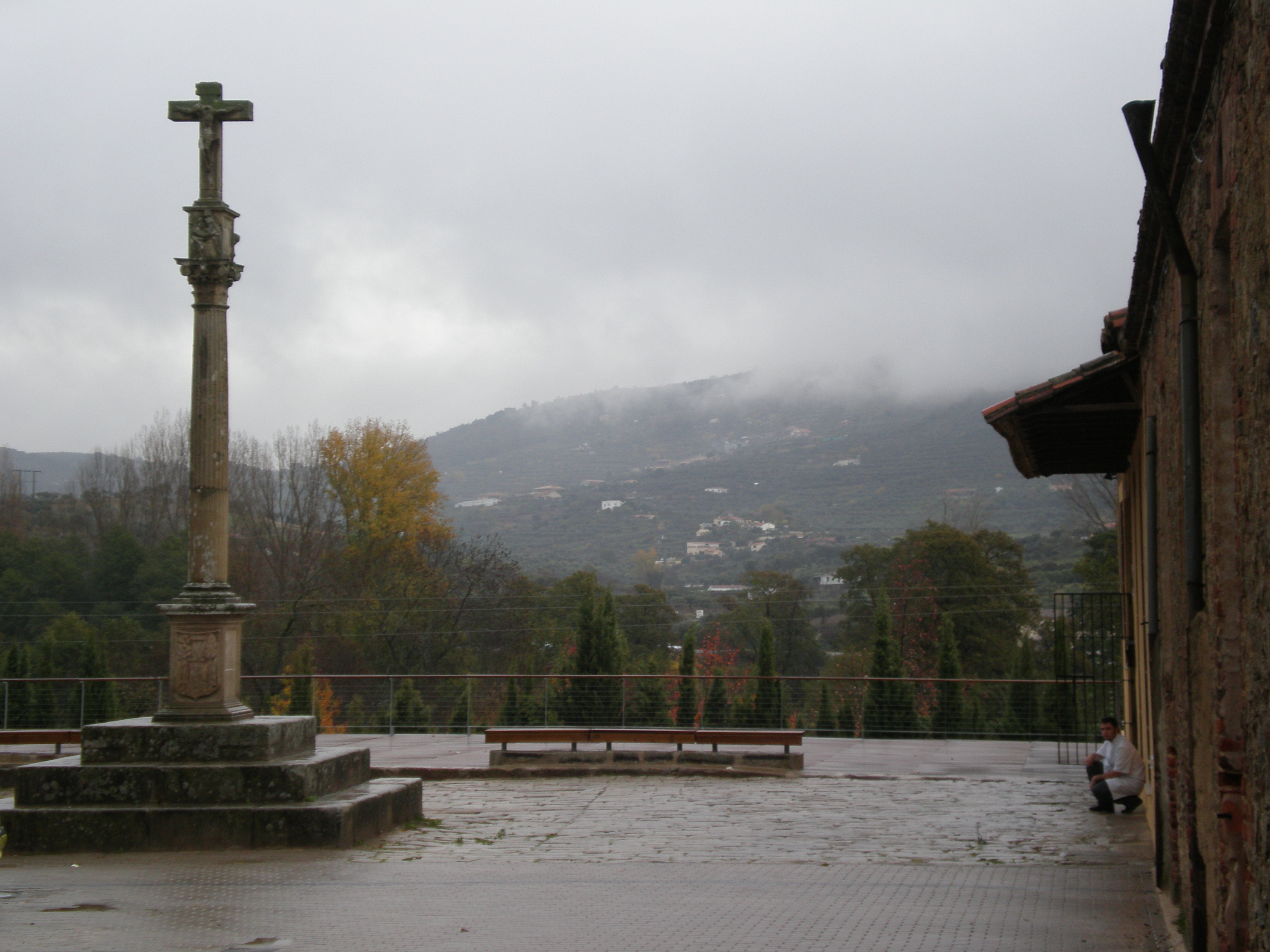 Plaza de la Cruz Dorada en la ciudad de Plasencia